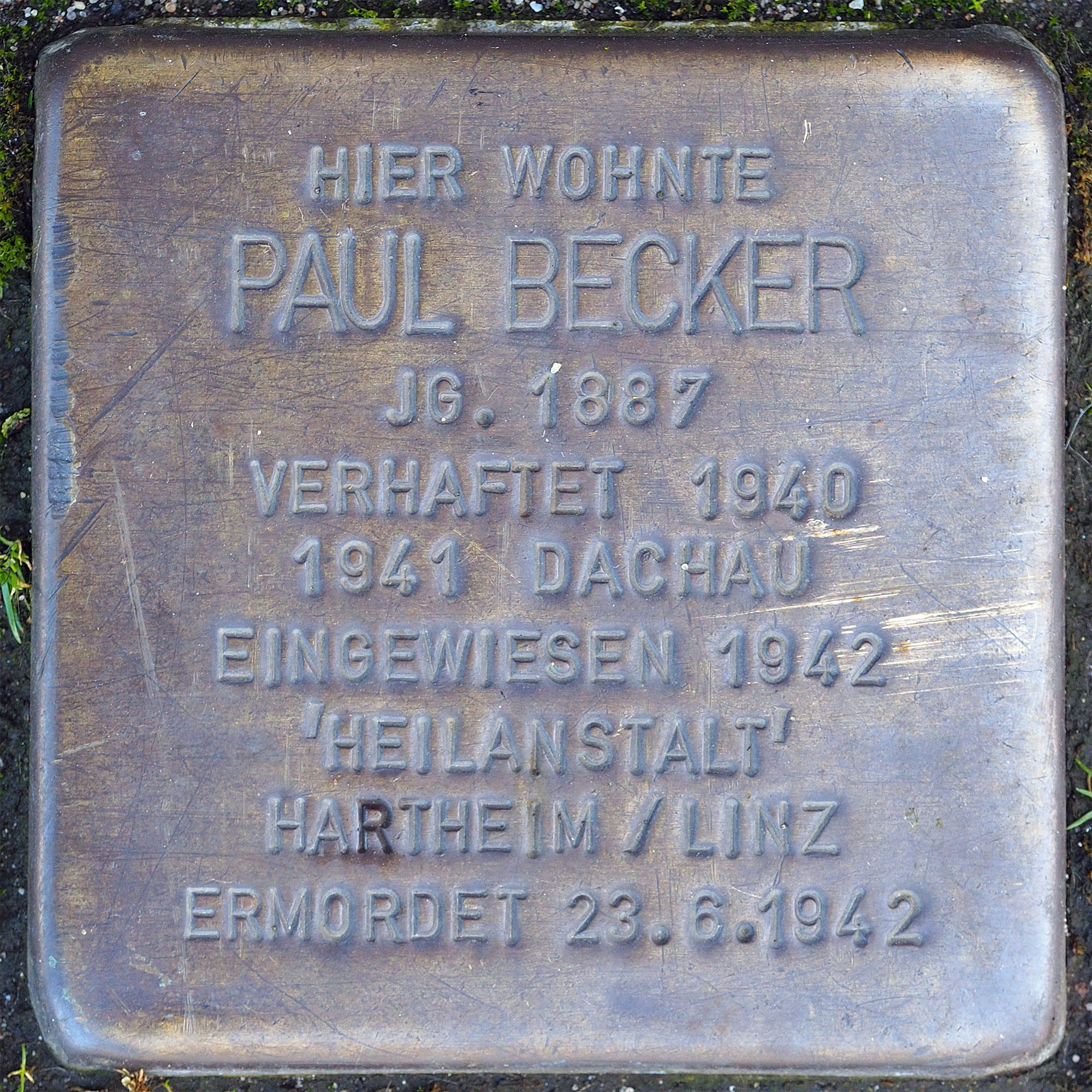 Stolpersteine MG: Becker, Paul